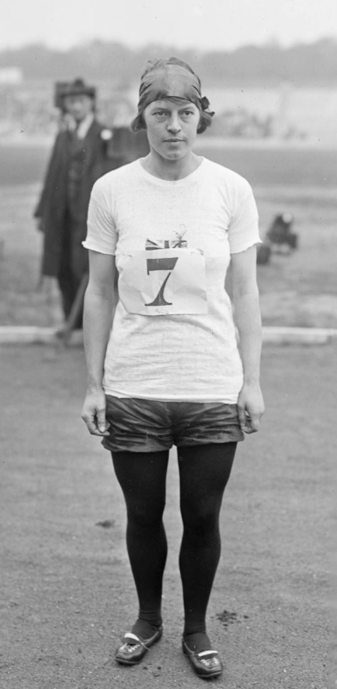 30-10-21, stade Pershing, [match France-Angleterre féminin], Miss Lines [gagnante du 100 yards] : [photographie de presse] / [Agence Rol]